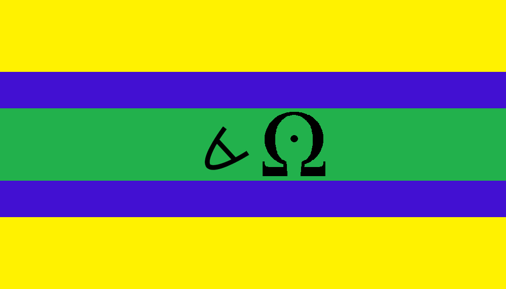 Bandera de Espíndola